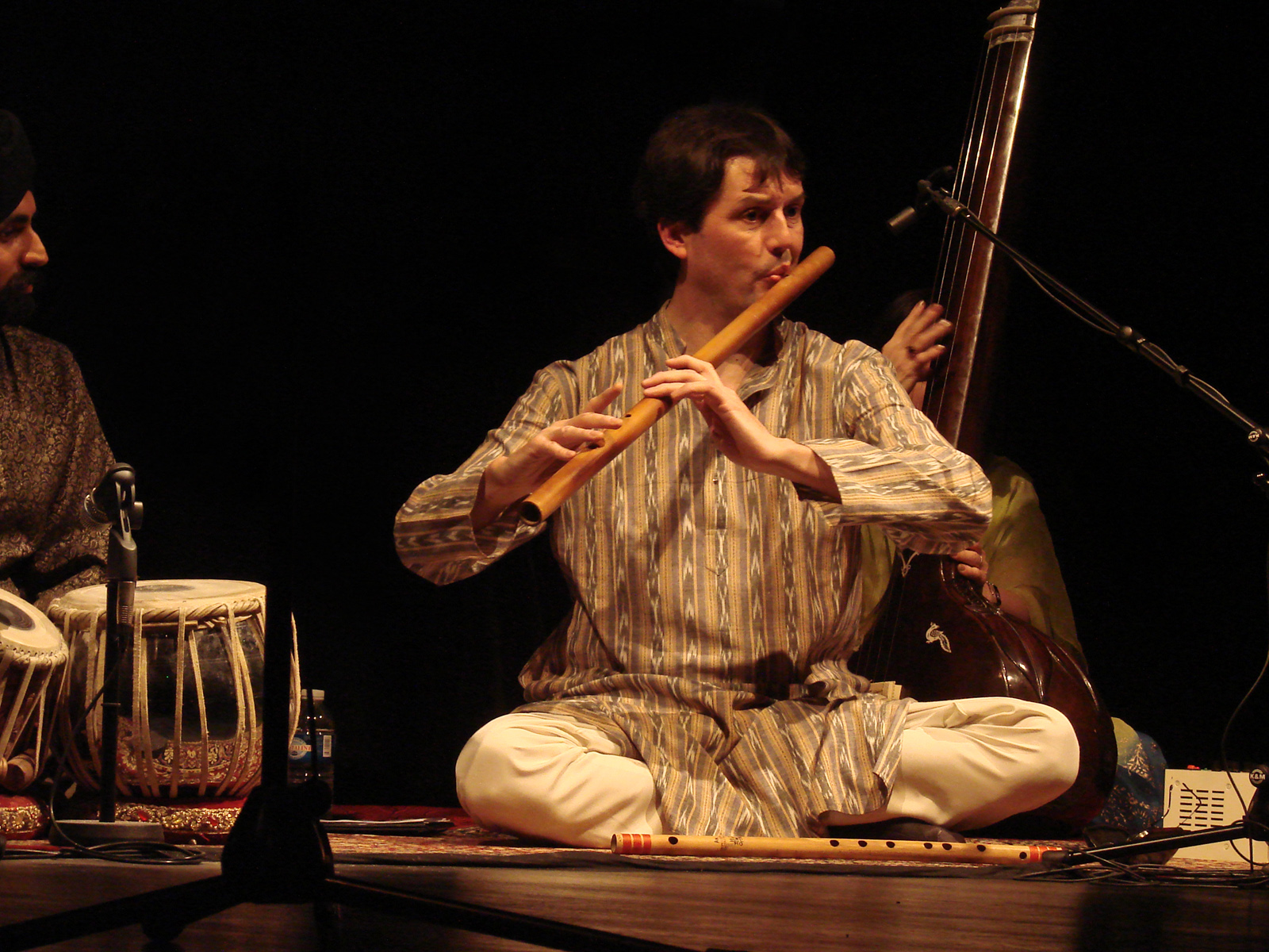 Henri Tournier jouant de la flûte Bansuri lors du spectacle d'Anurekha Ghosh de danse Kathak au Musée Guimet, le samedi 28 mars 2009 voir aussi